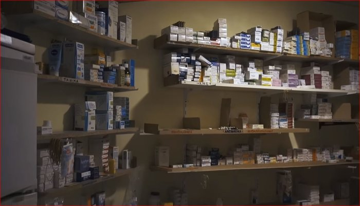 ΕΣΩΤΕΡΙΚΟΣ ΧΩΡΟΣ ΑΠΟΘΗΚΗΣ ΦΑΡΜΑΚΩΝ ΑΔΥΕ